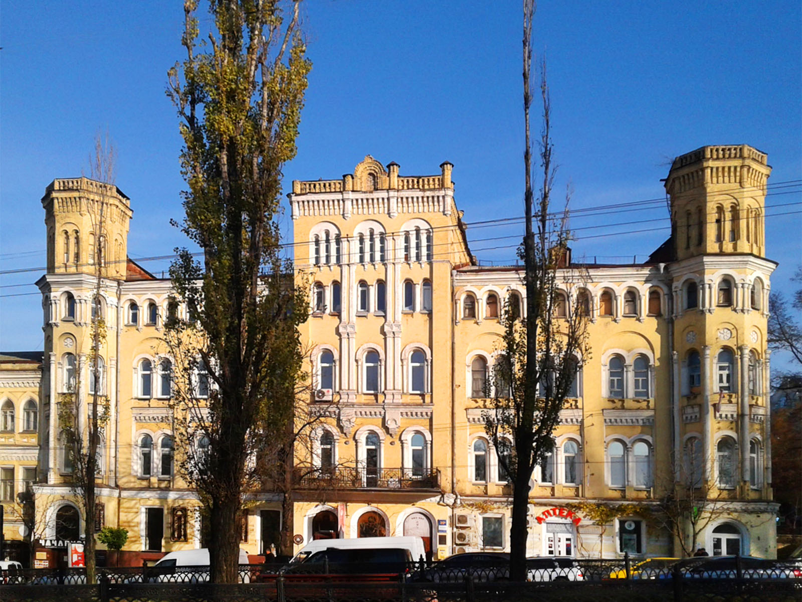 Будинок аптекаря Фроммета на бул. Тараса Шевченка, 36. Київ